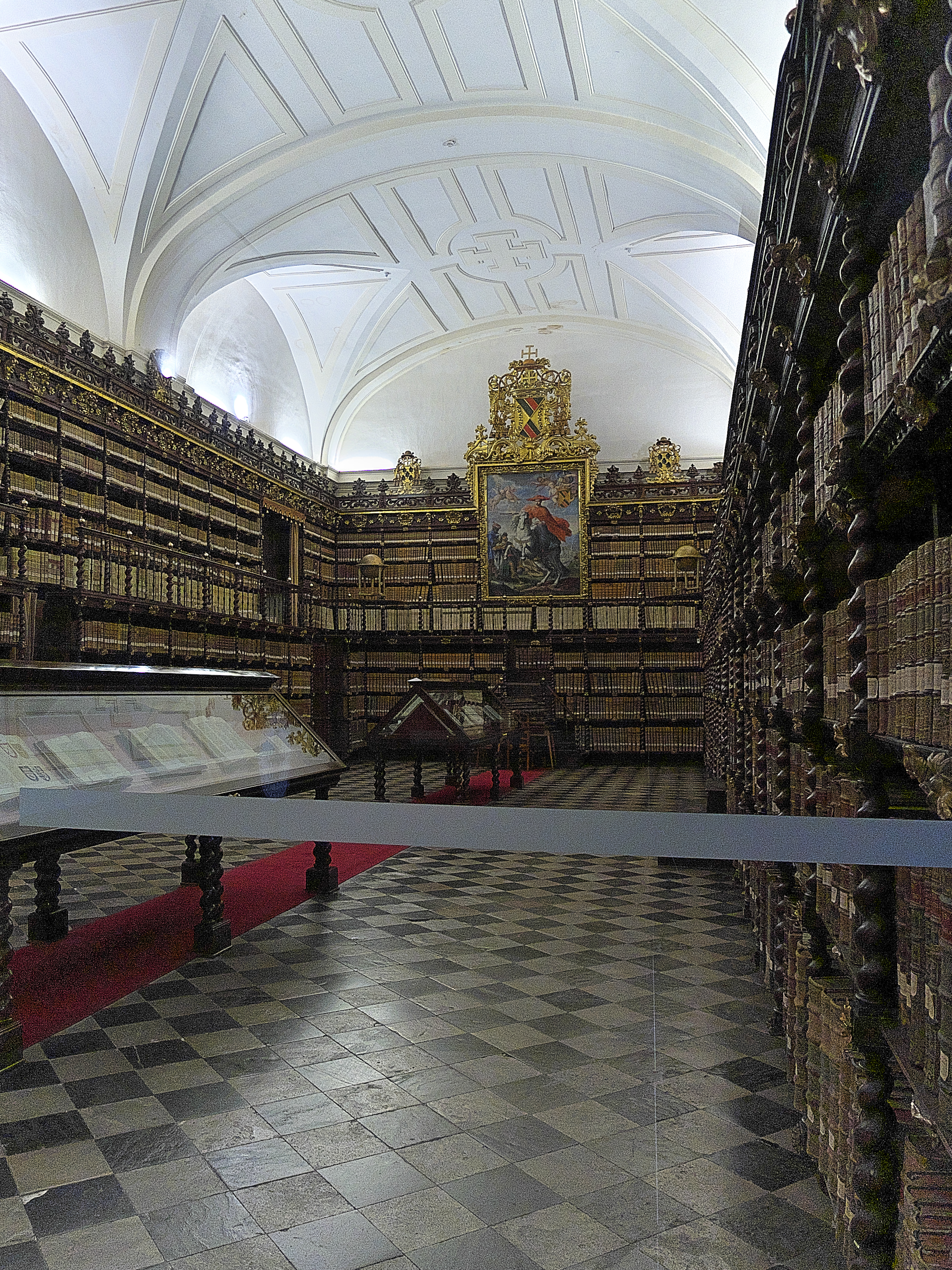 El cardenal Pedro González de Mendoza funda la biblioteca del Colegio Mayor de Santa Cruz (1483). Alonso de Manzano construye la actual biblioteca (1705). En esta biblioteca se conserva el famoso Beato de Valcabado (970) del monje Oveco.